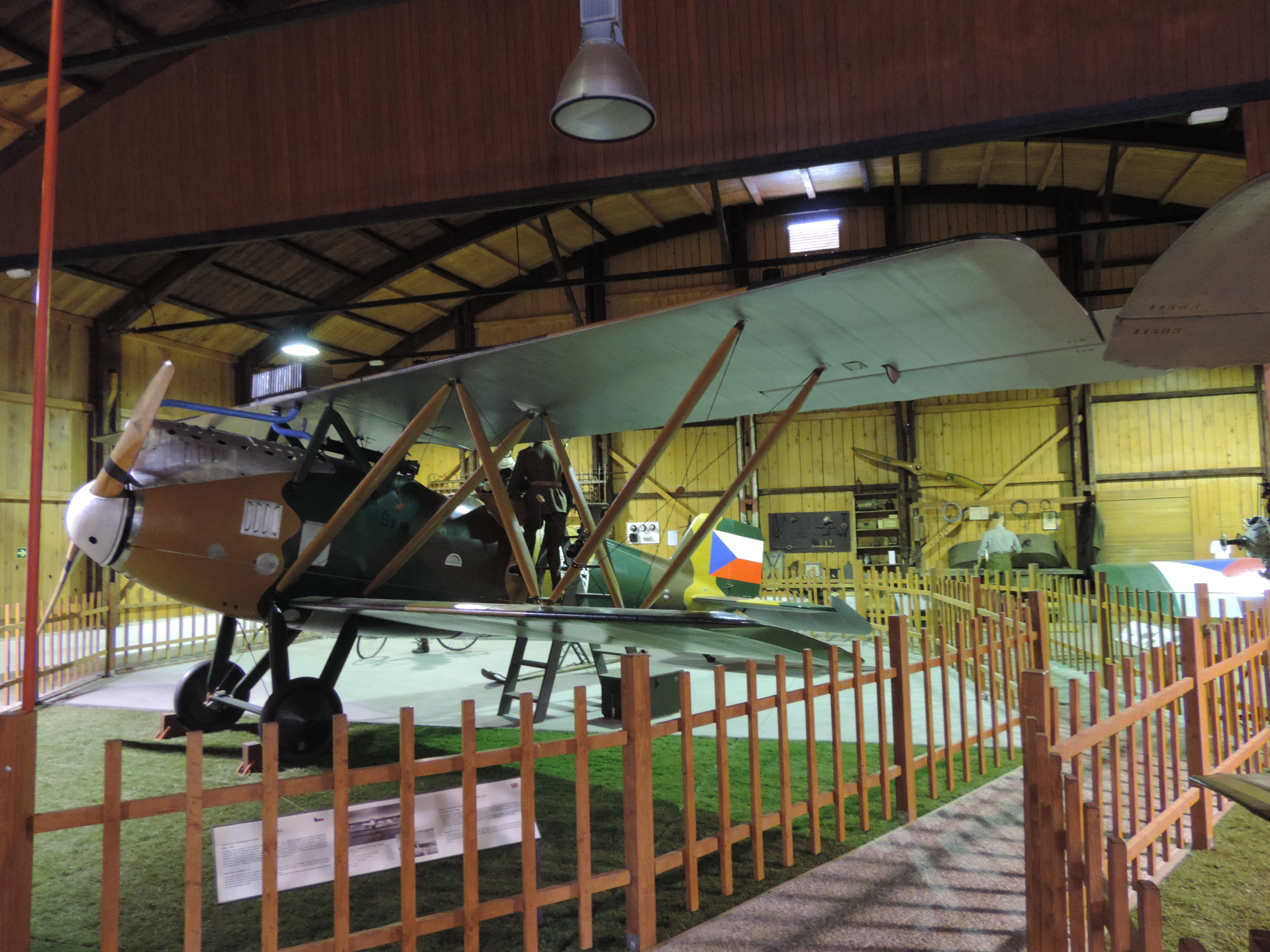 Letov Š-2 im Luftfahrtmuseum Kbely